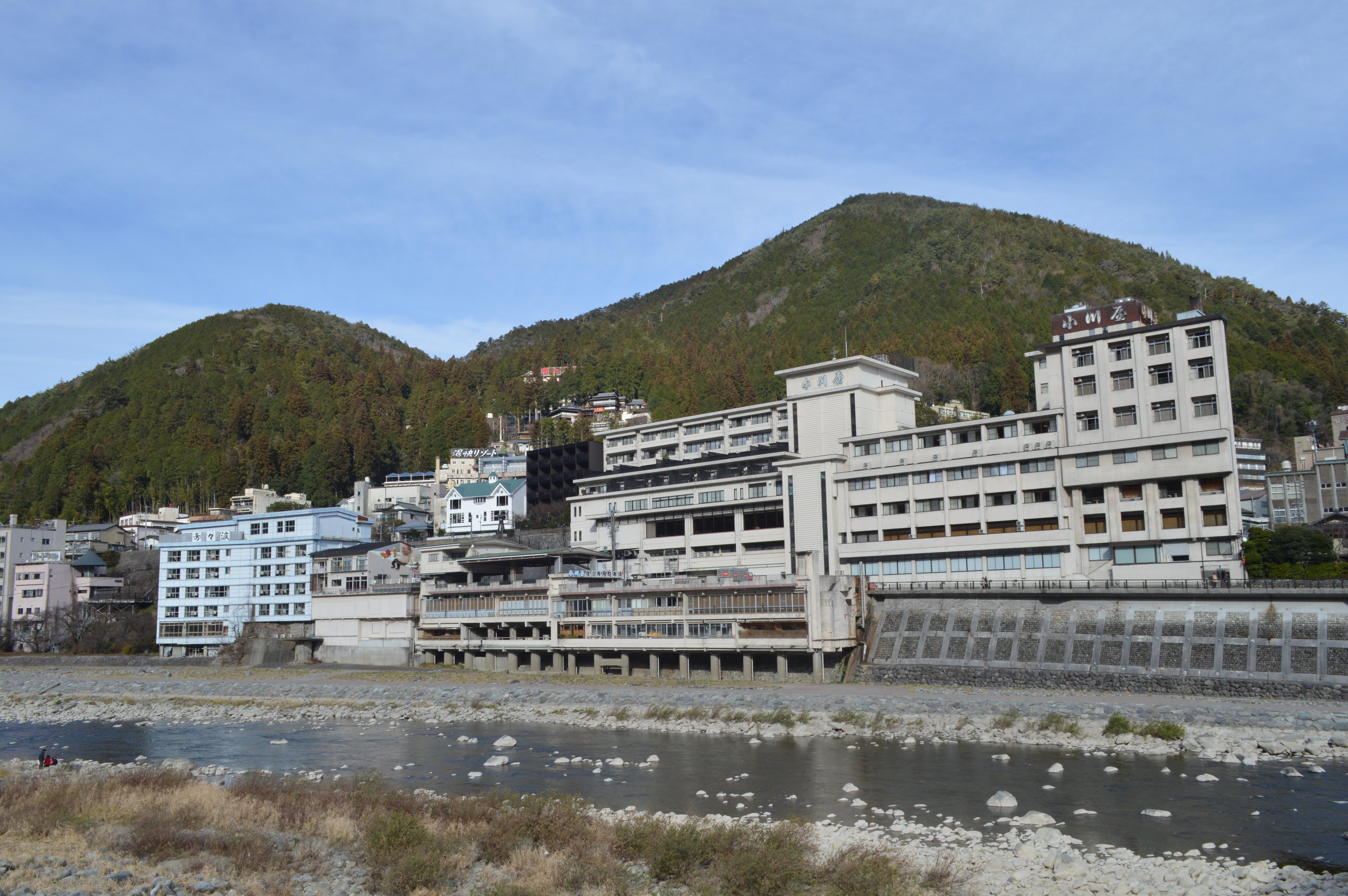 岐阜県下呂市の下呂温泉街と飛騨川。右奥は下呂富士。